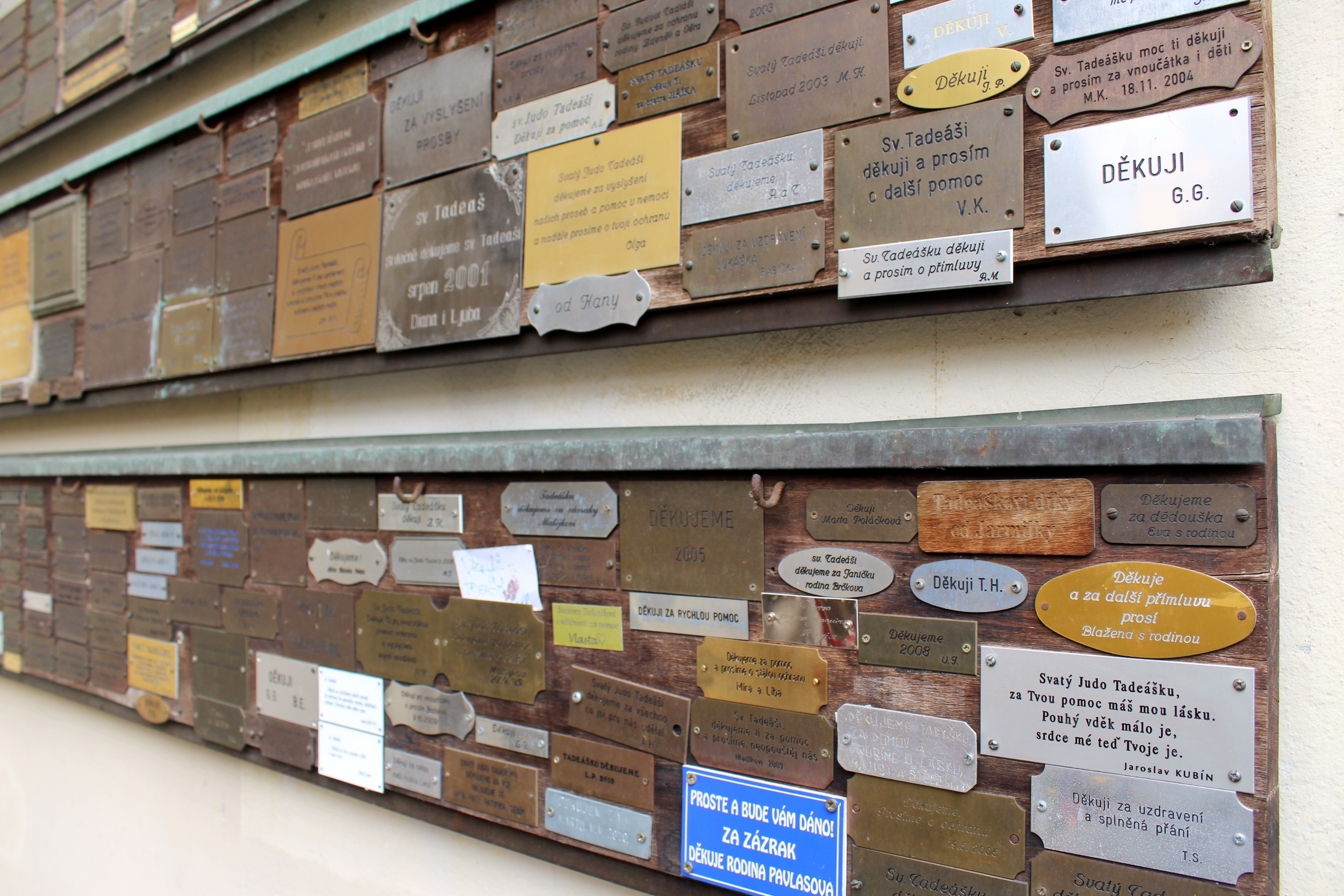 Kapucínský kostel sv. Josefa